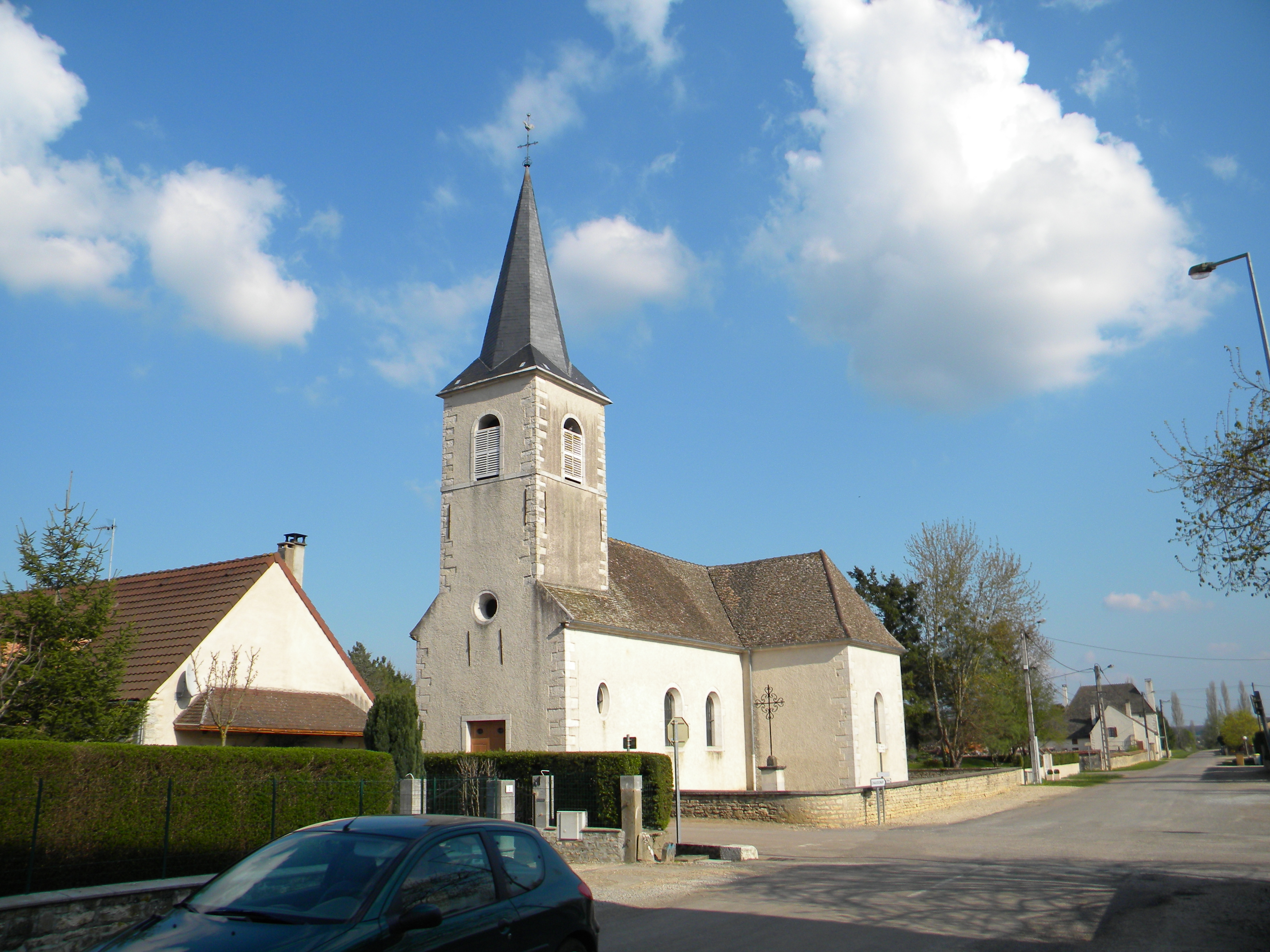 Ébaty